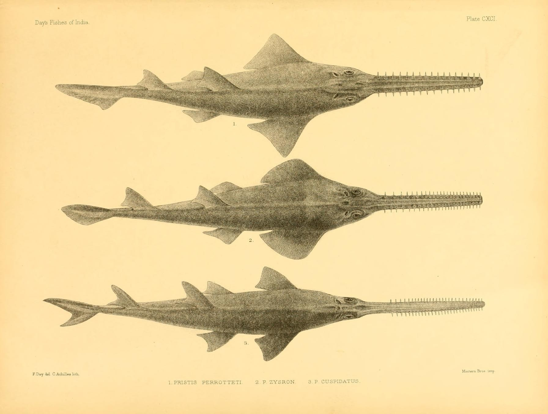 1. Pristis perotteti, 2. Pristis zijsron, 3. Anoxypristis cuspidata syn. Pristis cuspidata